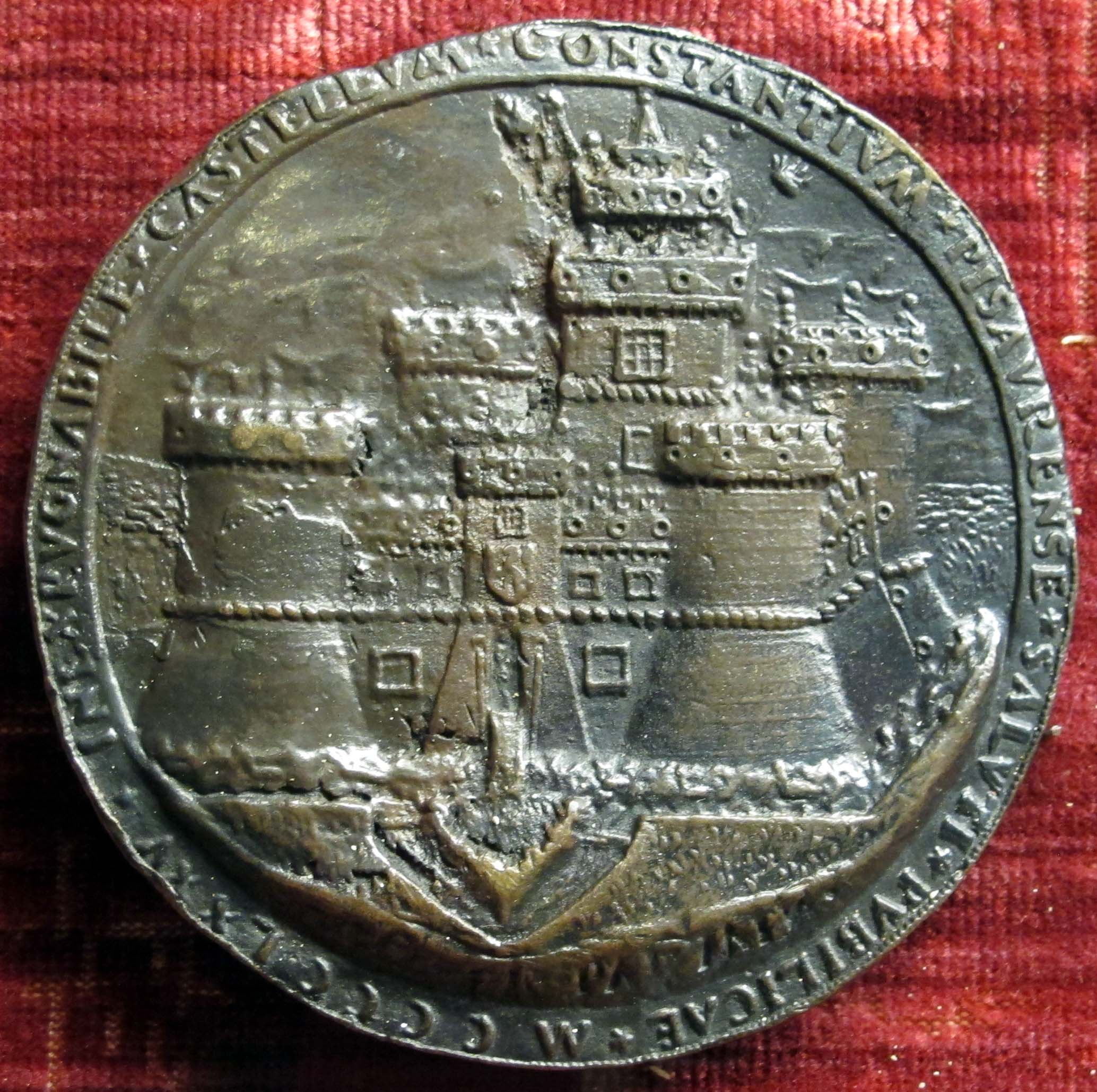 Gianfrancesco enzola, medaglia di costanzo sforza, recto con castello di pesaro, 1475